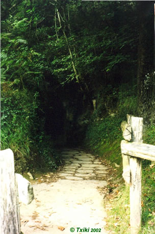 Entrée de la grotte d'Urdax Pyrénées).